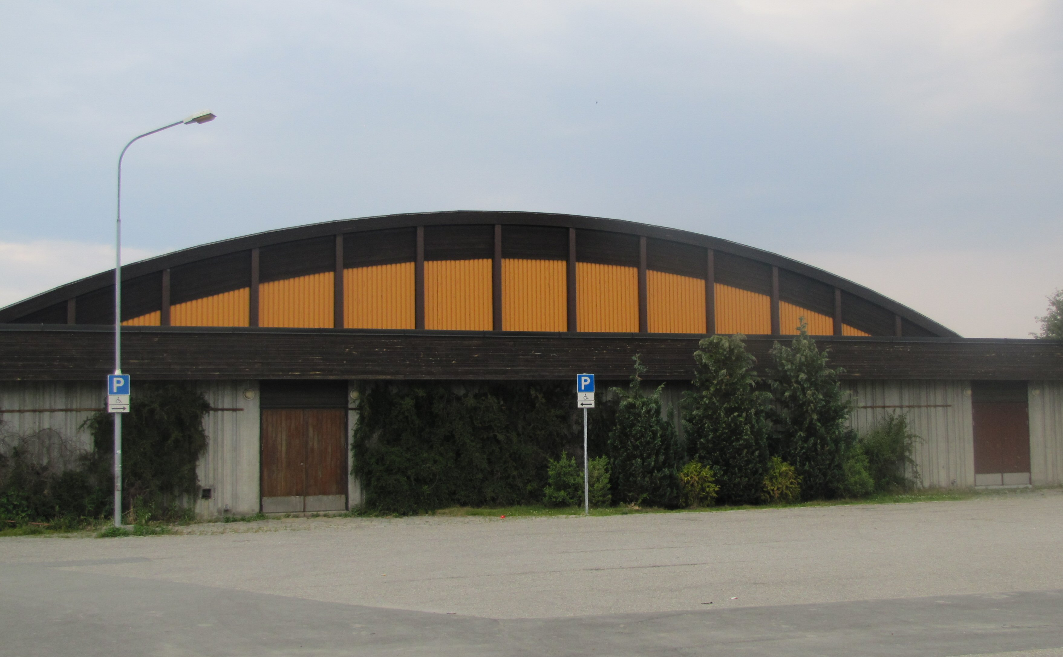 Leangen Ishall, Trondheim